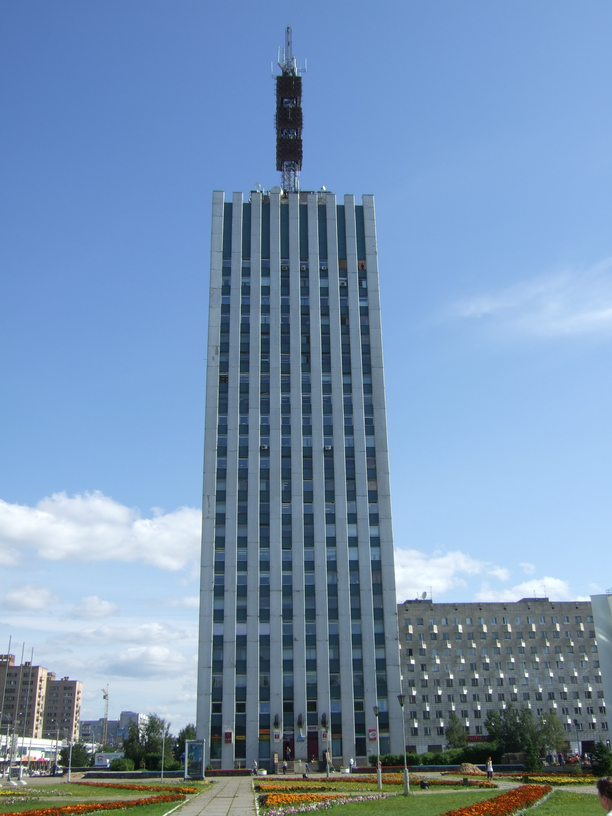 Здание проектных организаций ("высотка")